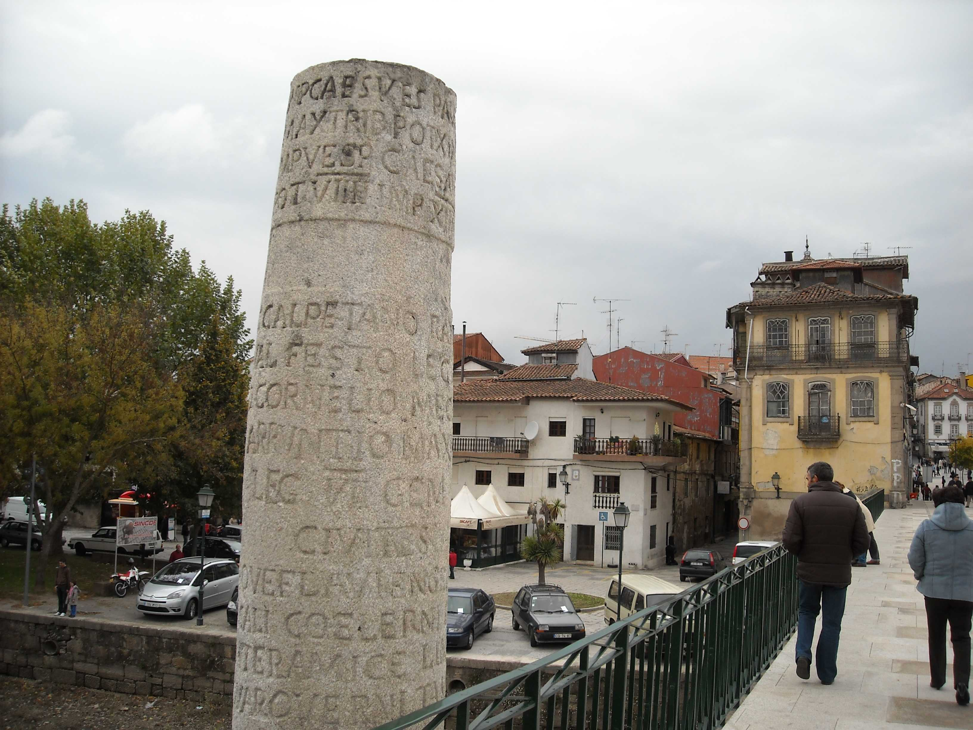 Chaves, Portugal, noviembre 2008 Chaves, Portugal, noviembre 2008